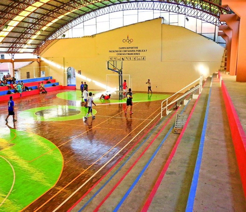 Campos deportivos de la Universidad Xavier de Sucre.